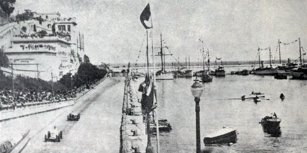 Grand Prix de Monaco 1935, le long des quais.